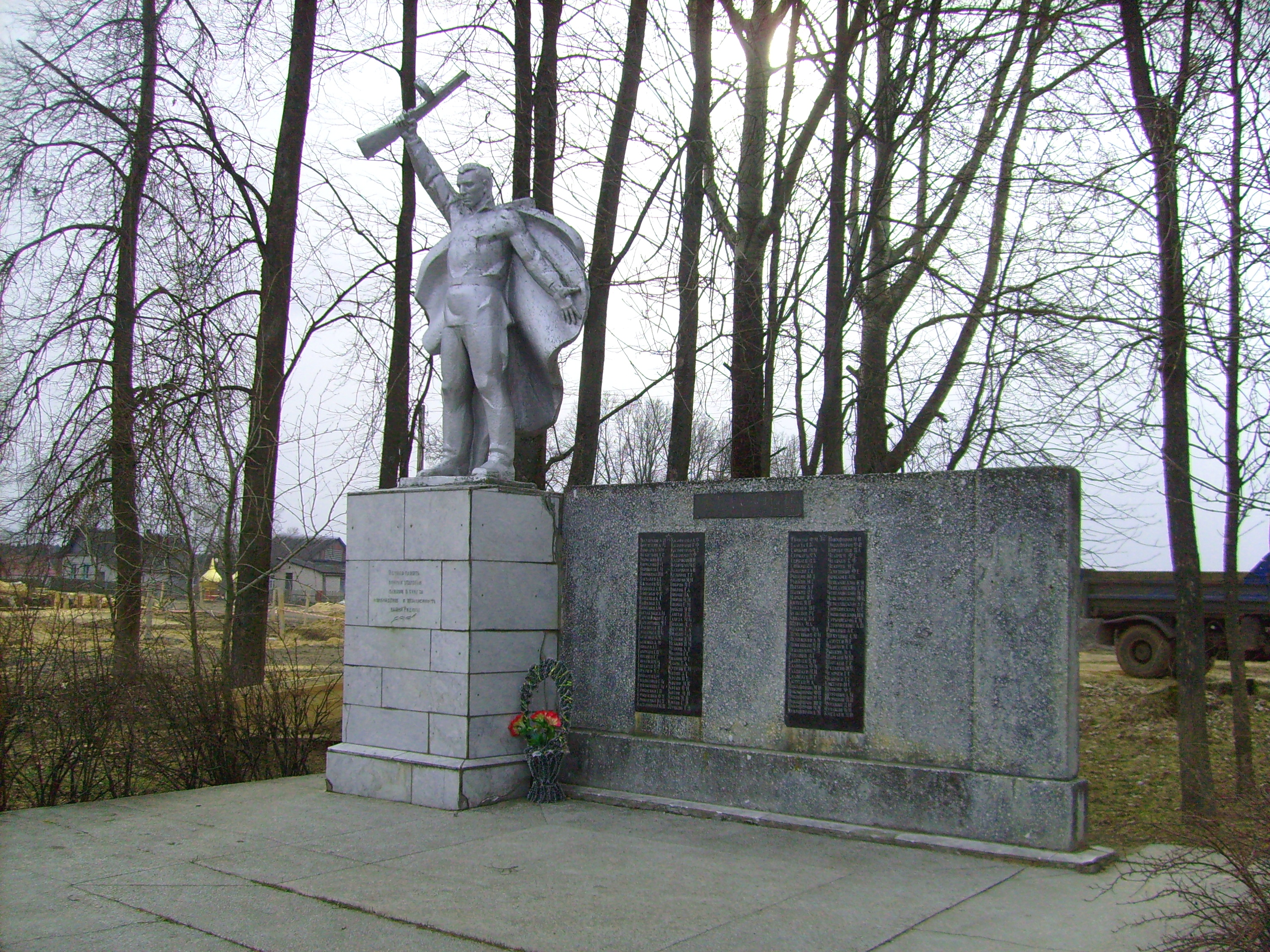 Братская могила в деревне Заходы (Шкловский район, Фащевский сельсовет)